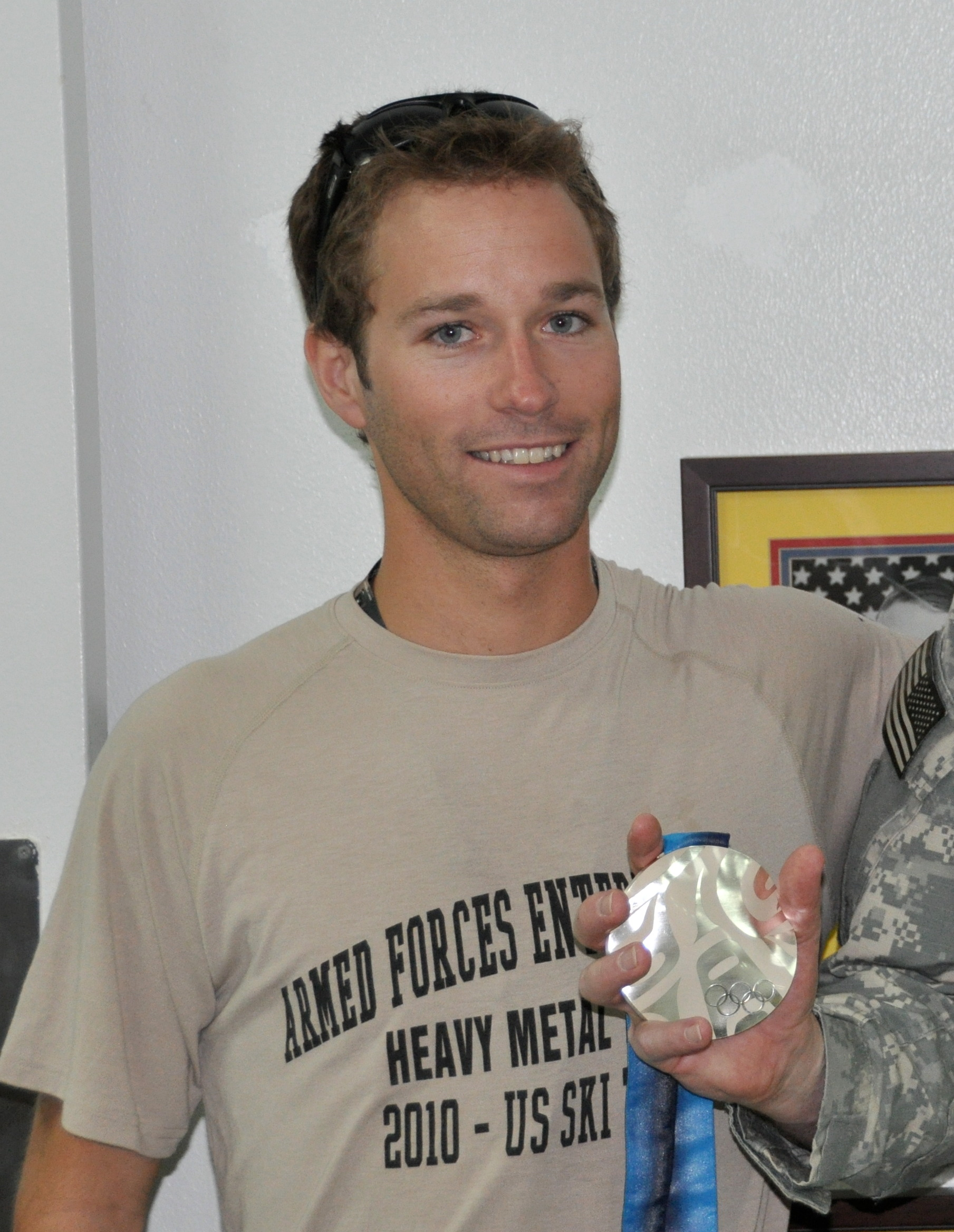 Brett Camerota